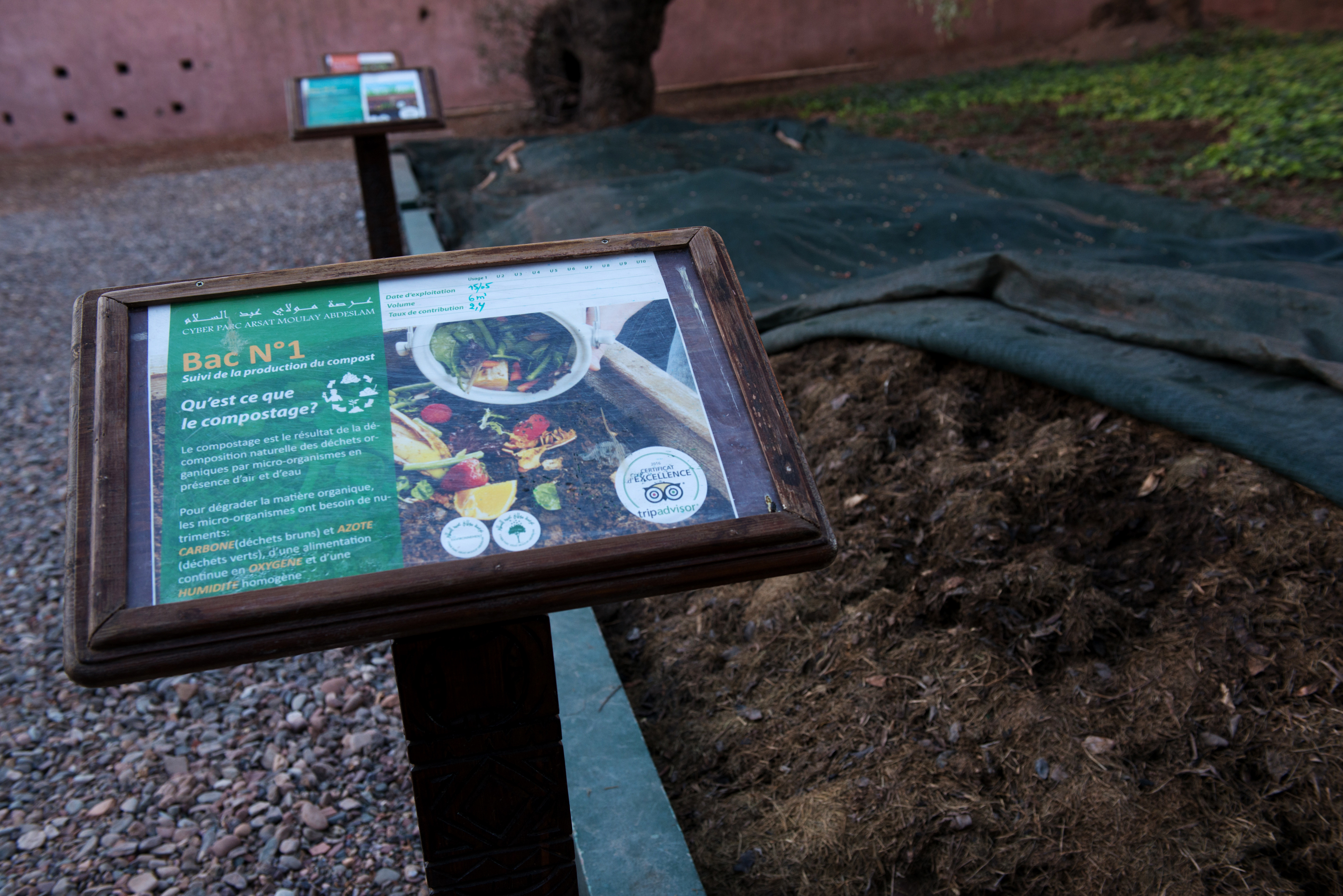 Bacs de compostage